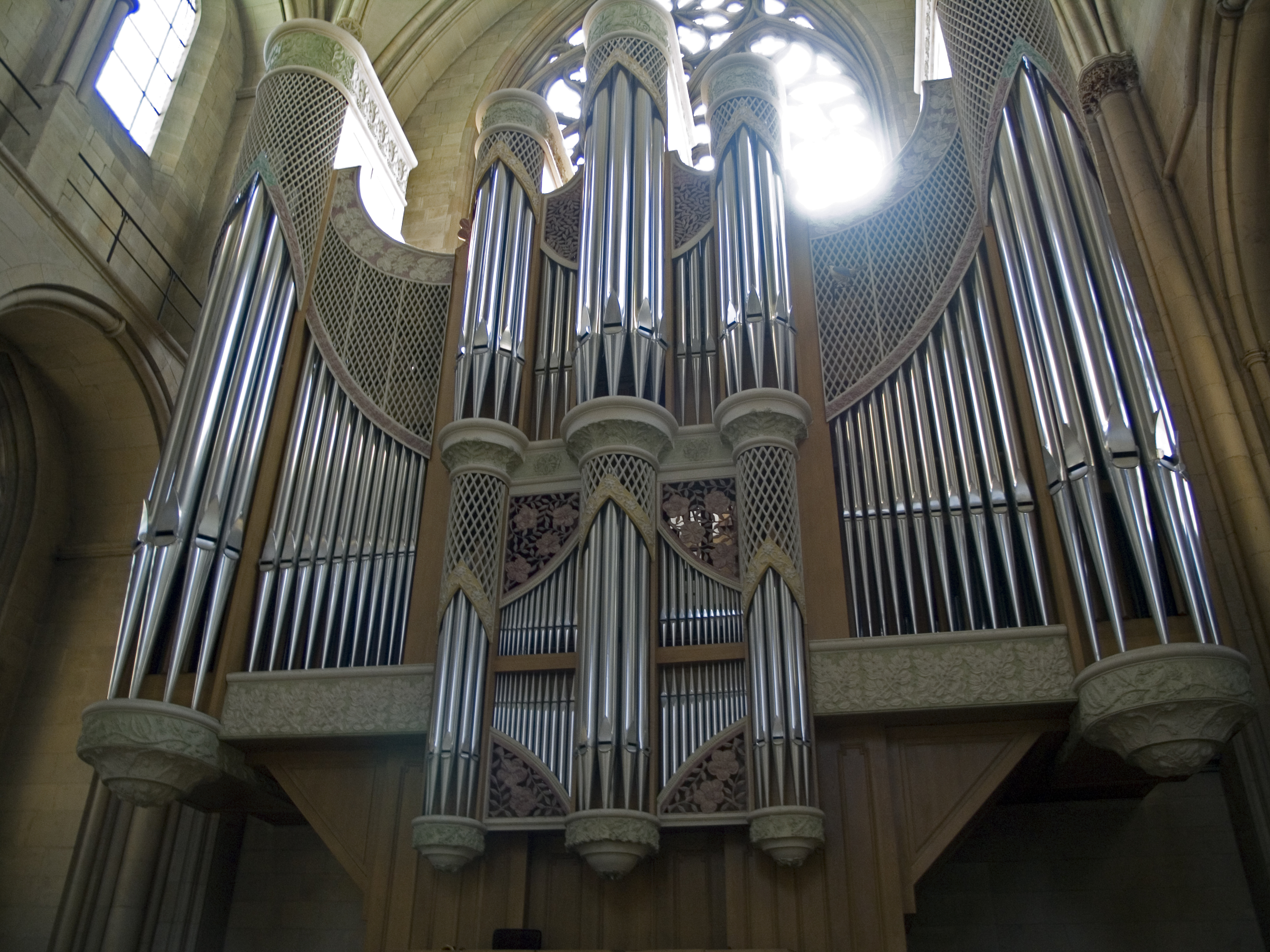 Северный Рейн - Вестфалия, Мюнстер - собор Святого Павла